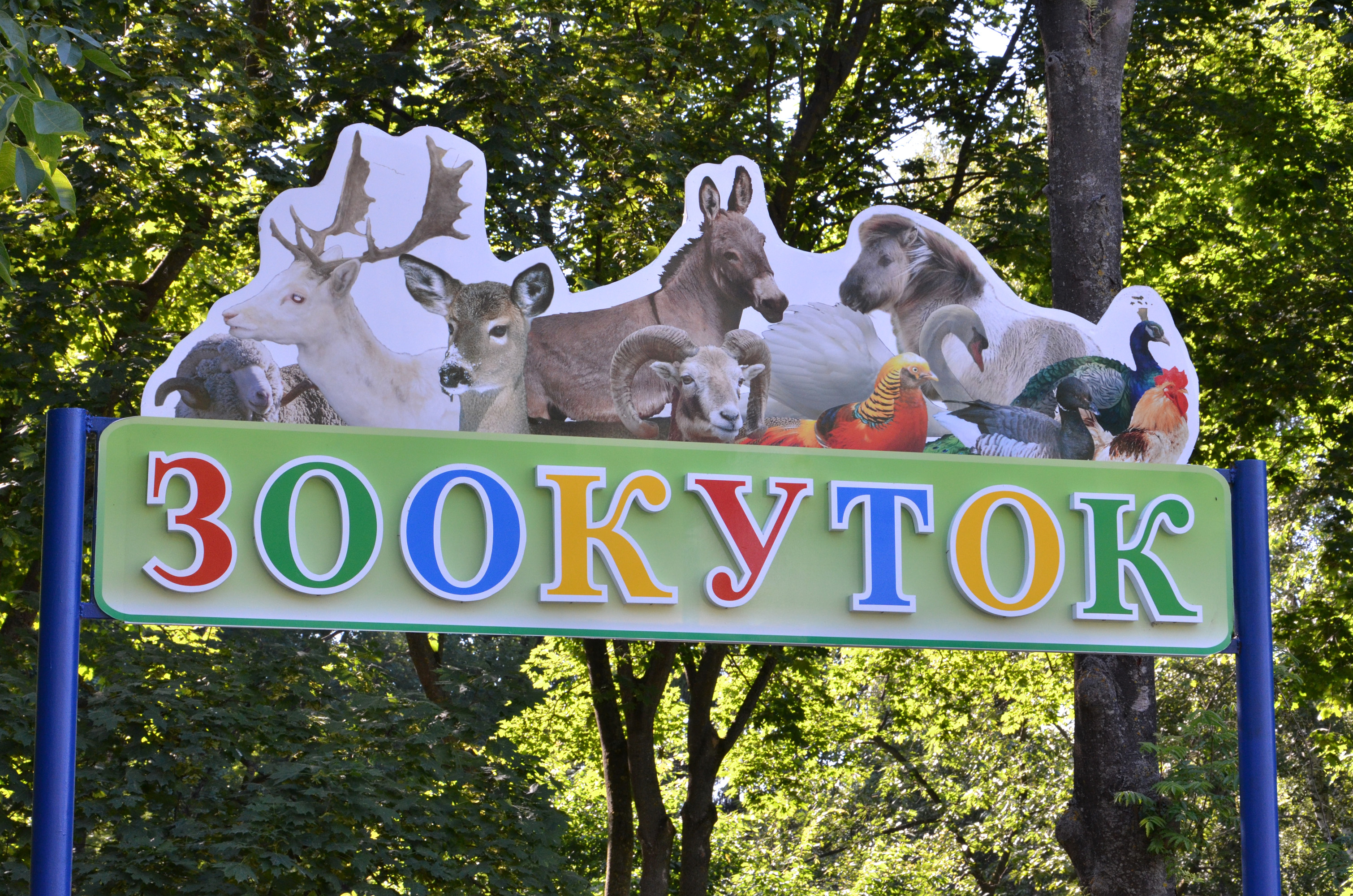 Вхід у зоокуток із центральної алеї, гідропарк «Топільче» в Тернополі.